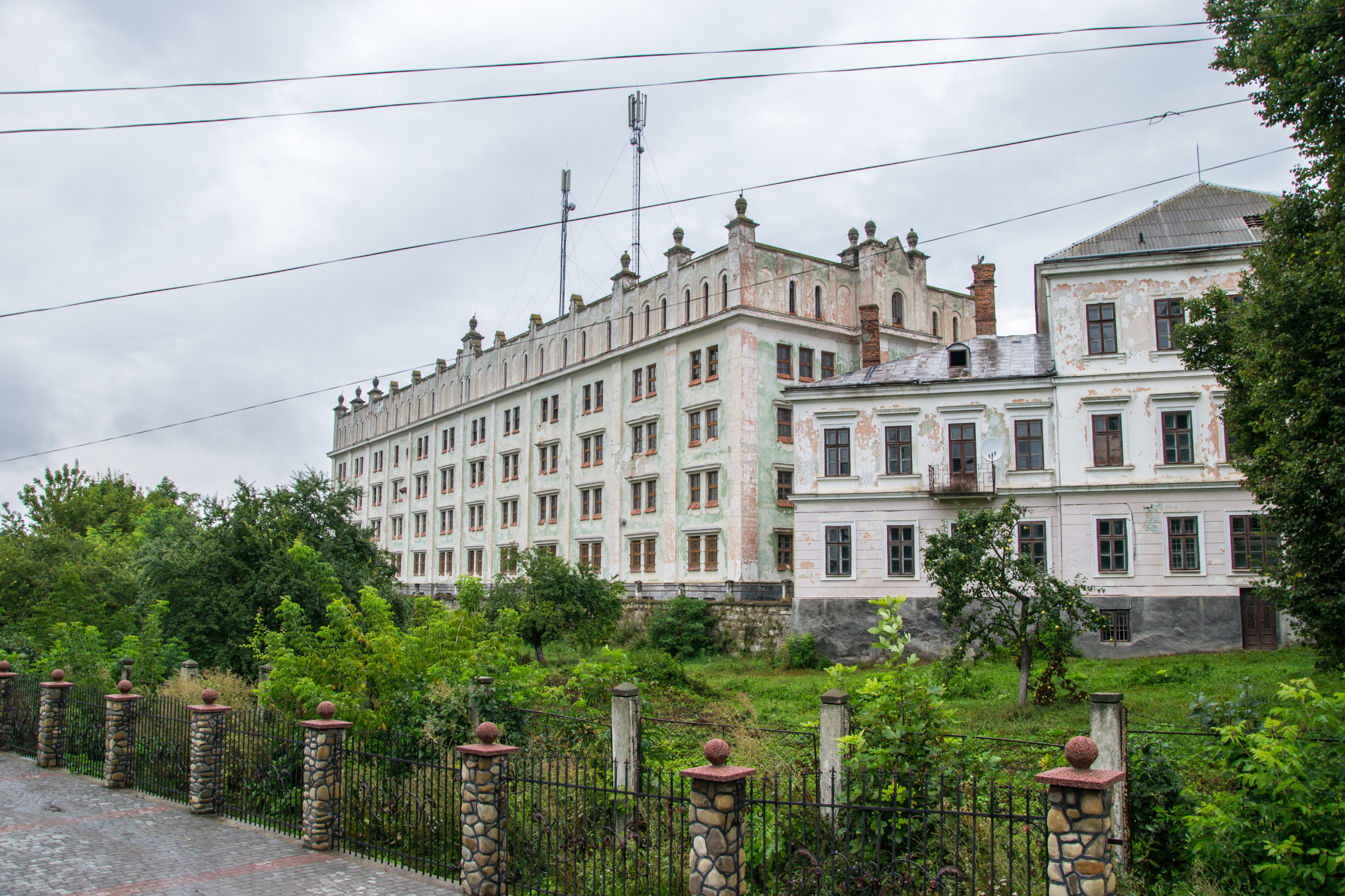 Замок (мур.), село Ягільниця